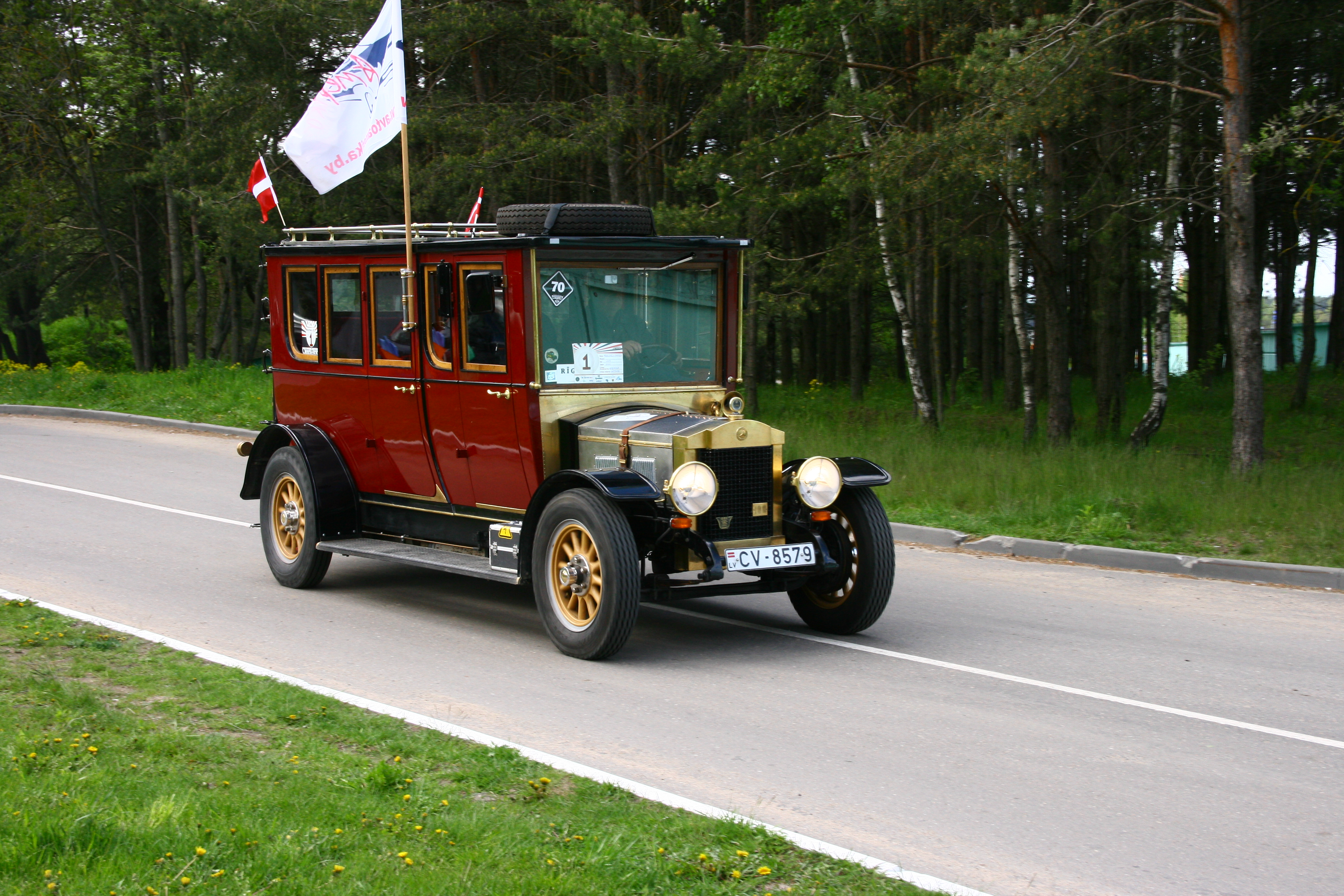 Mersedes 1903 года на слете Ретро-Минск 2015